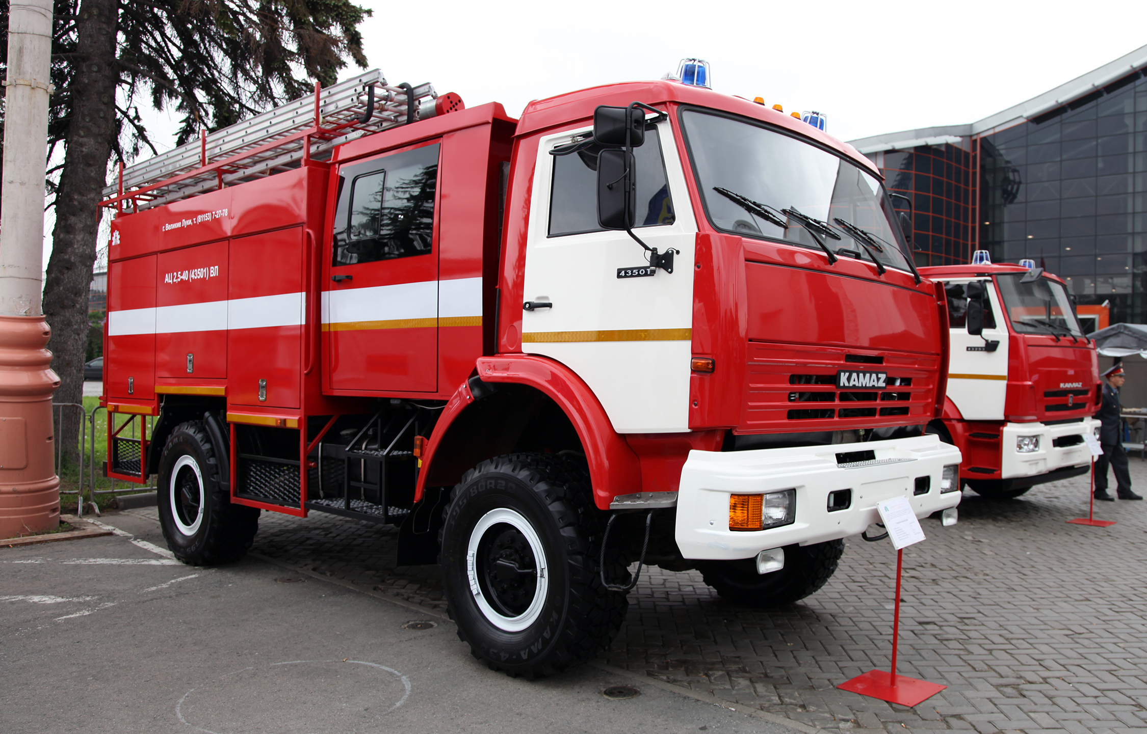 Автоцистерна пожарная АЦ-2,5-40 ВЛ на шасси КАМАЗ-43501 (Firefighting vehicle ATs-2,5-40 VL on KAMAZ-43501 chassis)